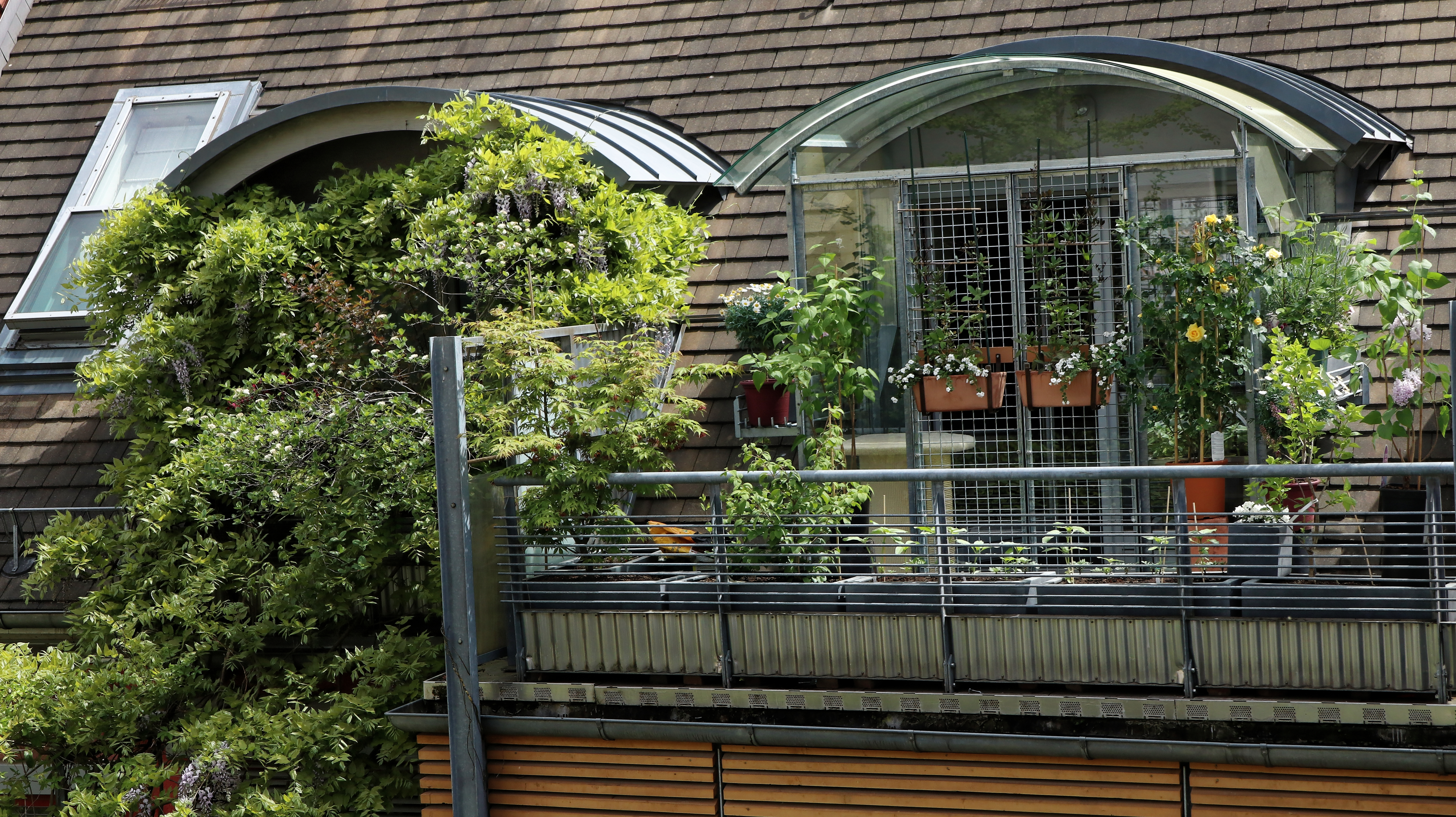 Die beiden Terrassen von Haus 12 (links) und Haus 11. Haus 12 voll eingegrünt, Terrasse von Haus 11 (rechts) noch nicht eingewachsen, deshalb etwas sichtbar noch die Gitterkonstruktion des katzensicheren Durchgangs